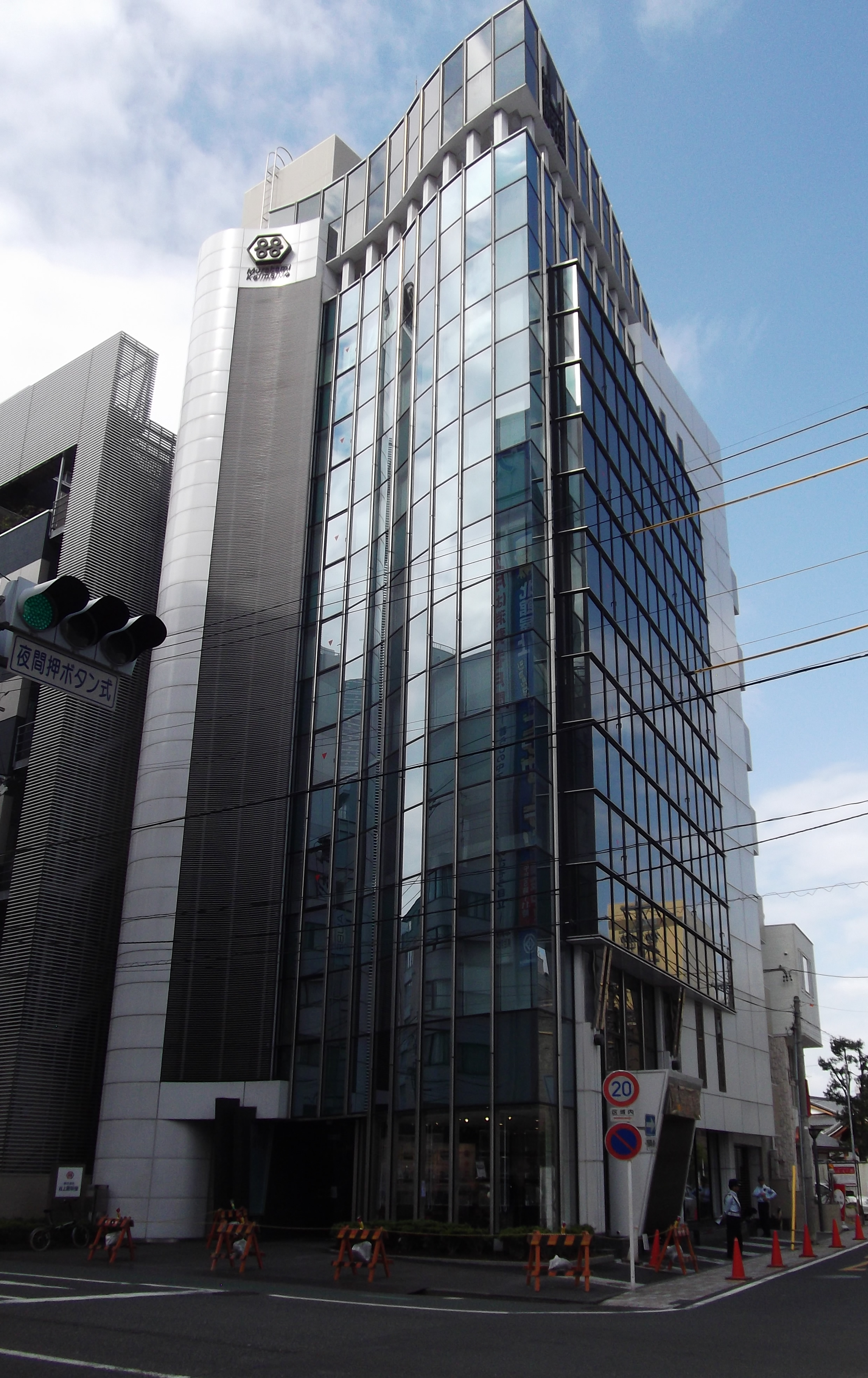 村上開明堂の本社ビル